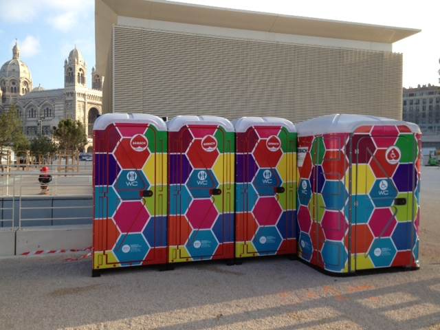 Esempio di bagno personalizzato